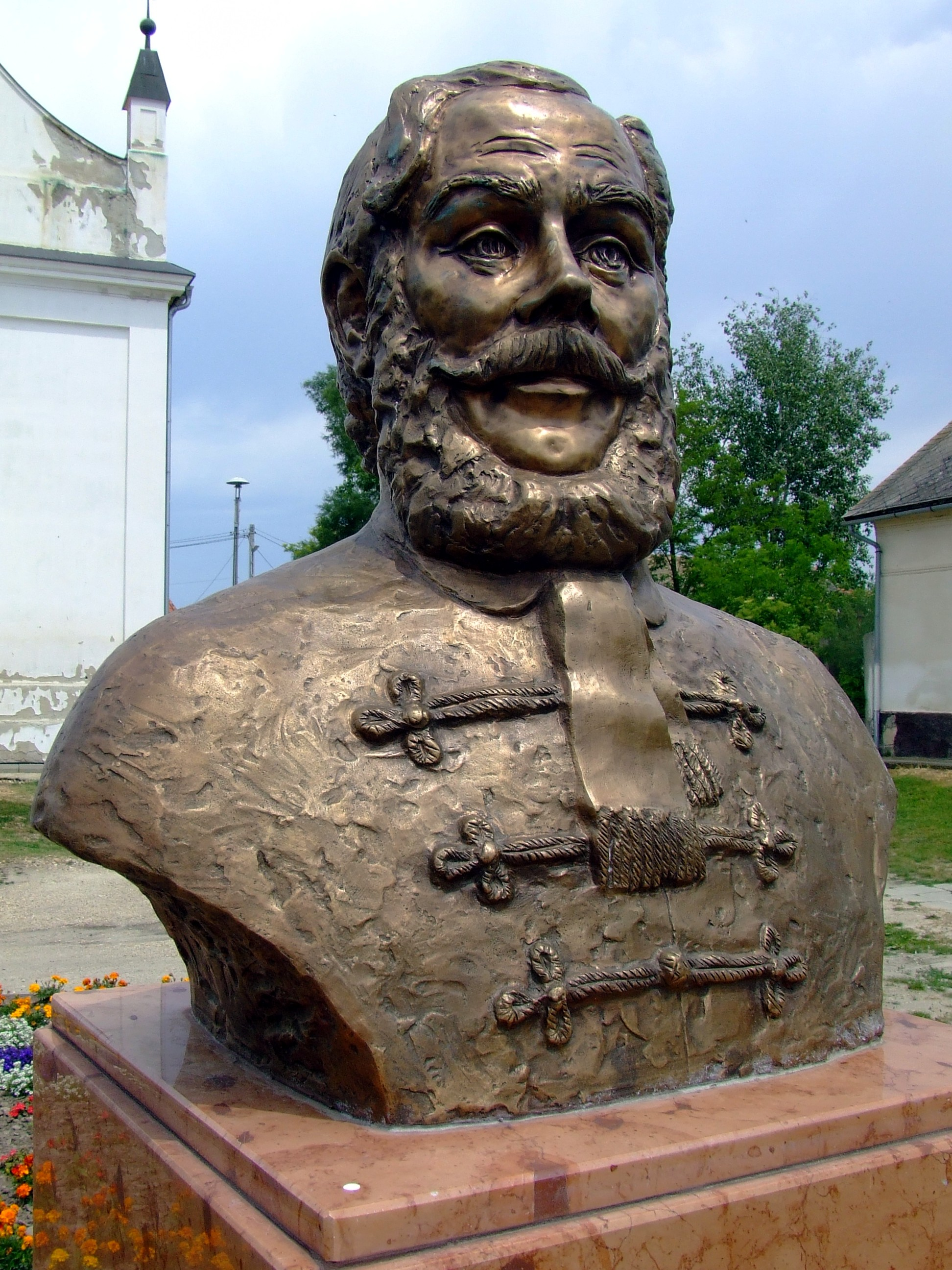 Kossuth Lajos mellszobra Makádon. Sebestyén Benedek alkotása